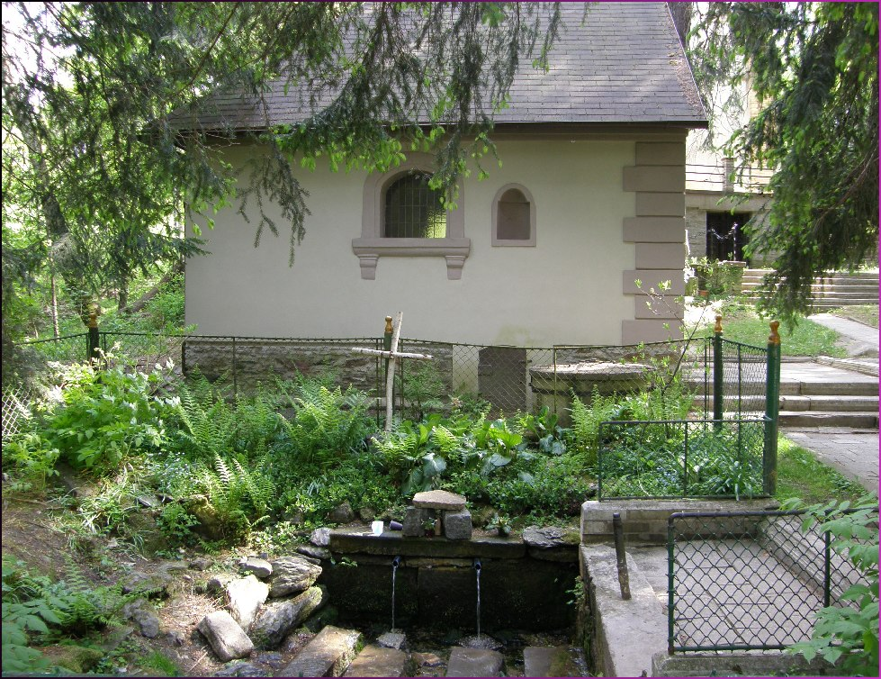 Kaple a pramen v Rokoli